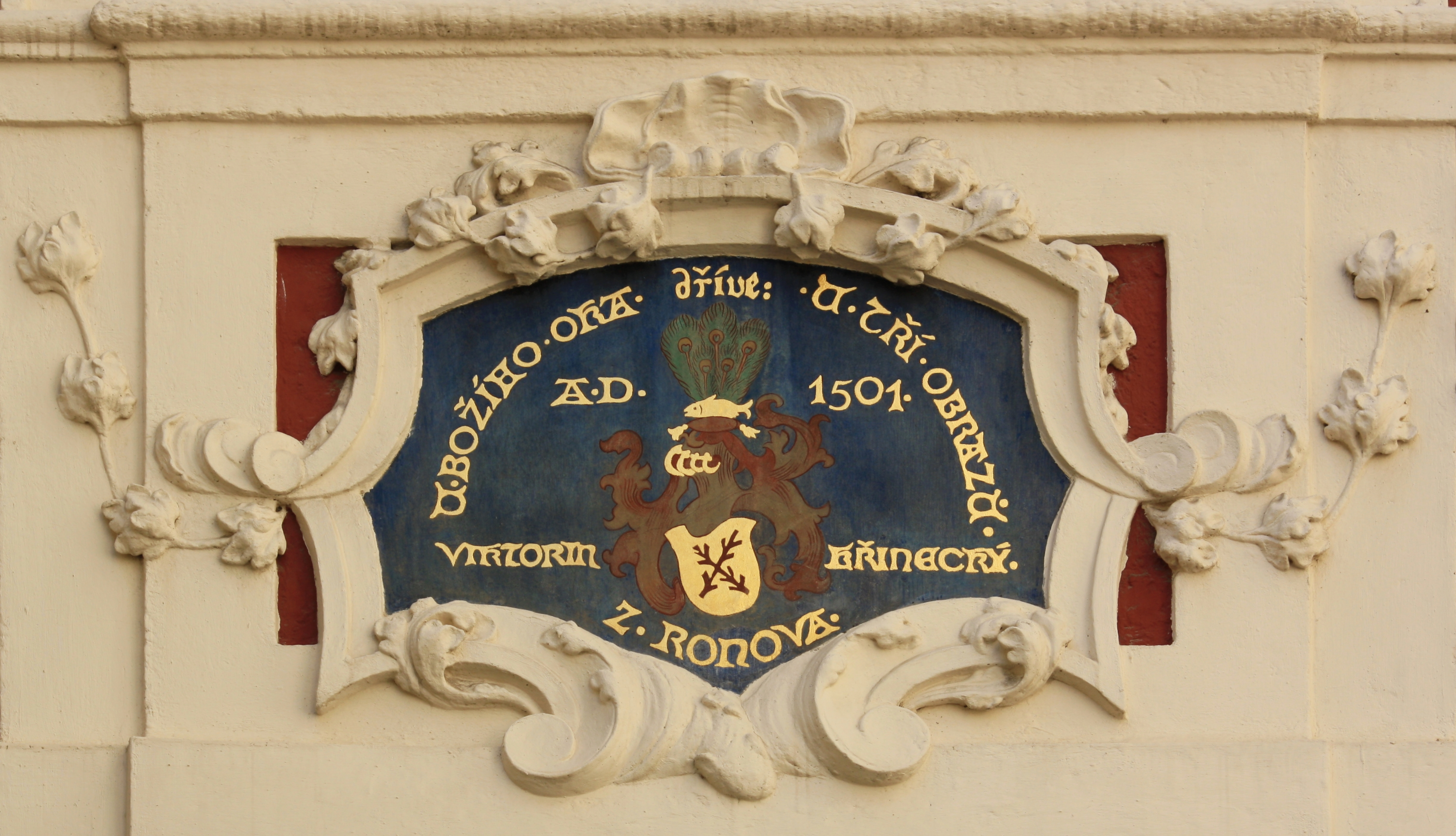 Praha, Staré Město - domovní znamení U Božího oka, dříve U Tří obrázků